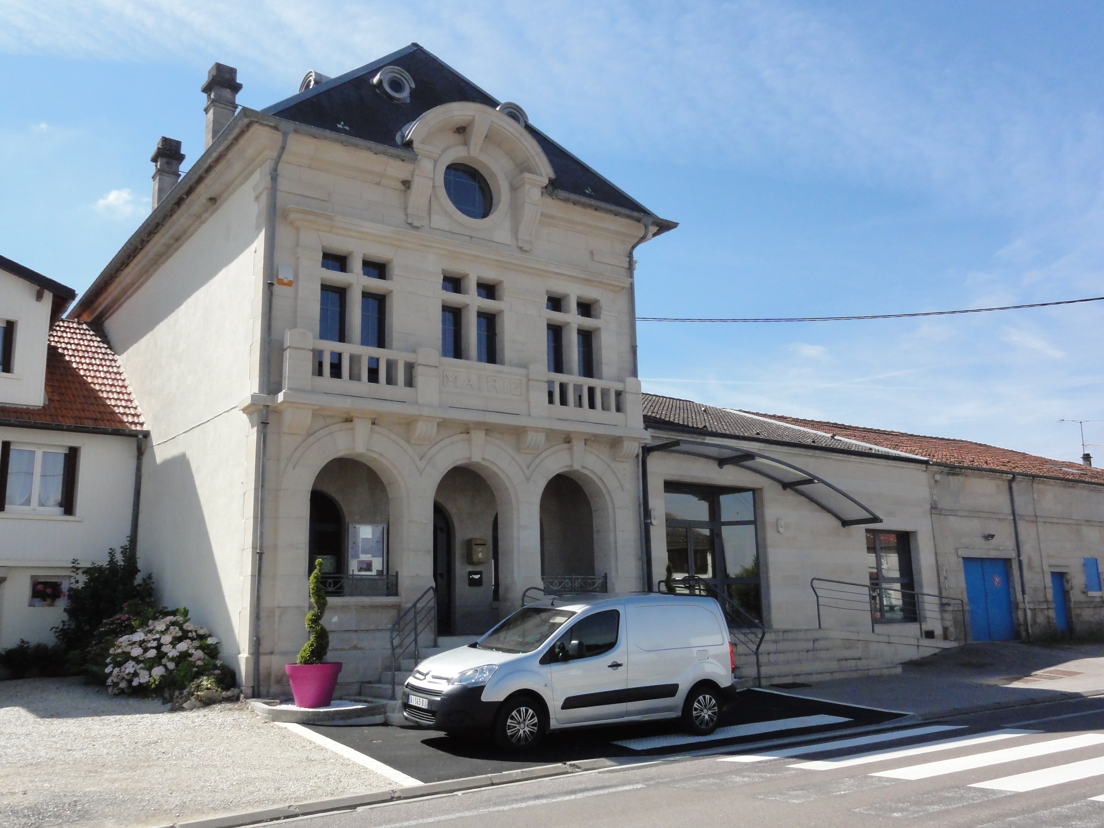 Andernay (Meuse) mairie